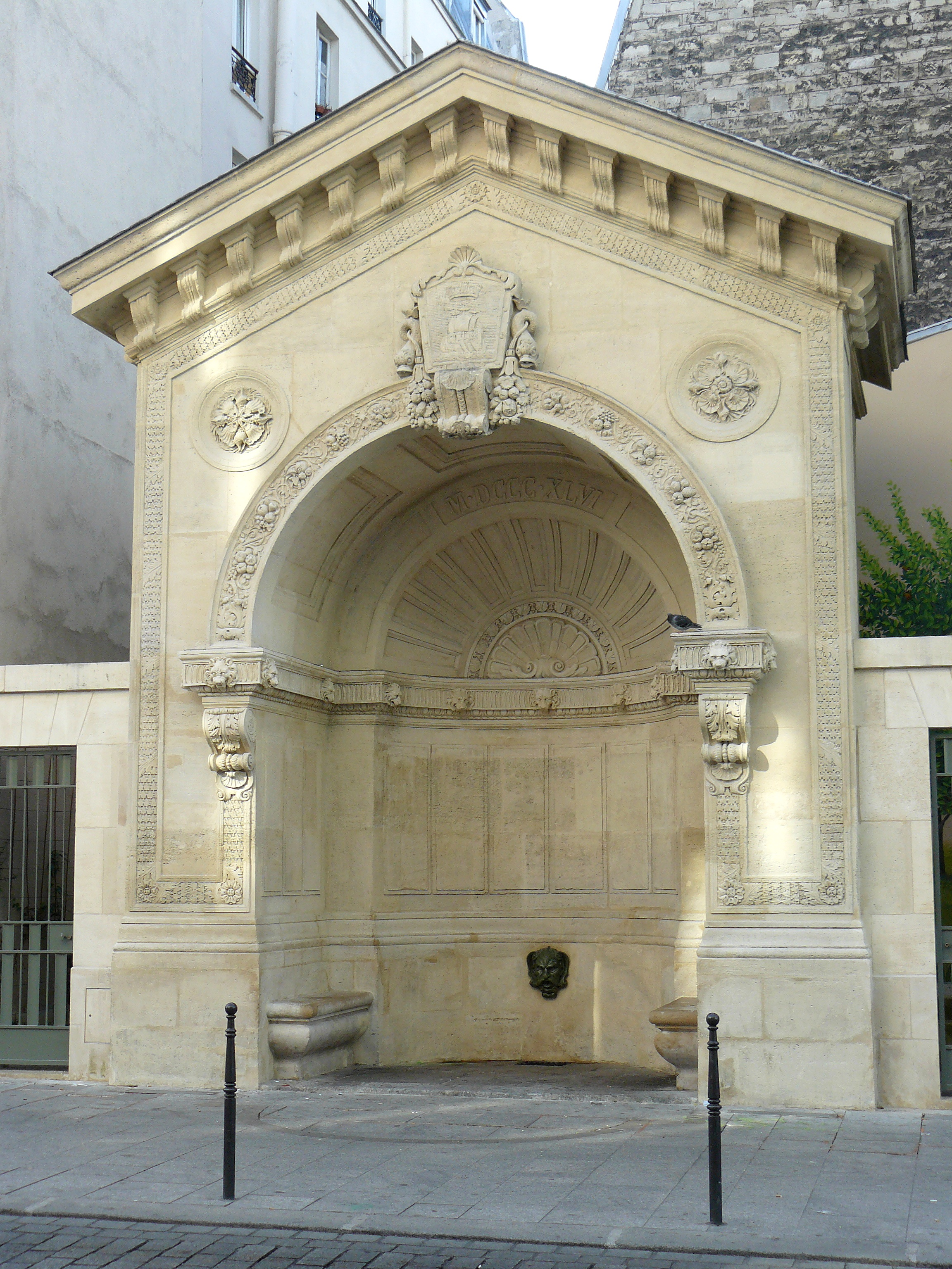 Fontaine de la Roquette, rue de la Roquette (Paris 11e arrond.) - Construite en 1846, restaurée en 2010.